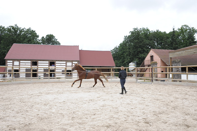 Manège extérieur